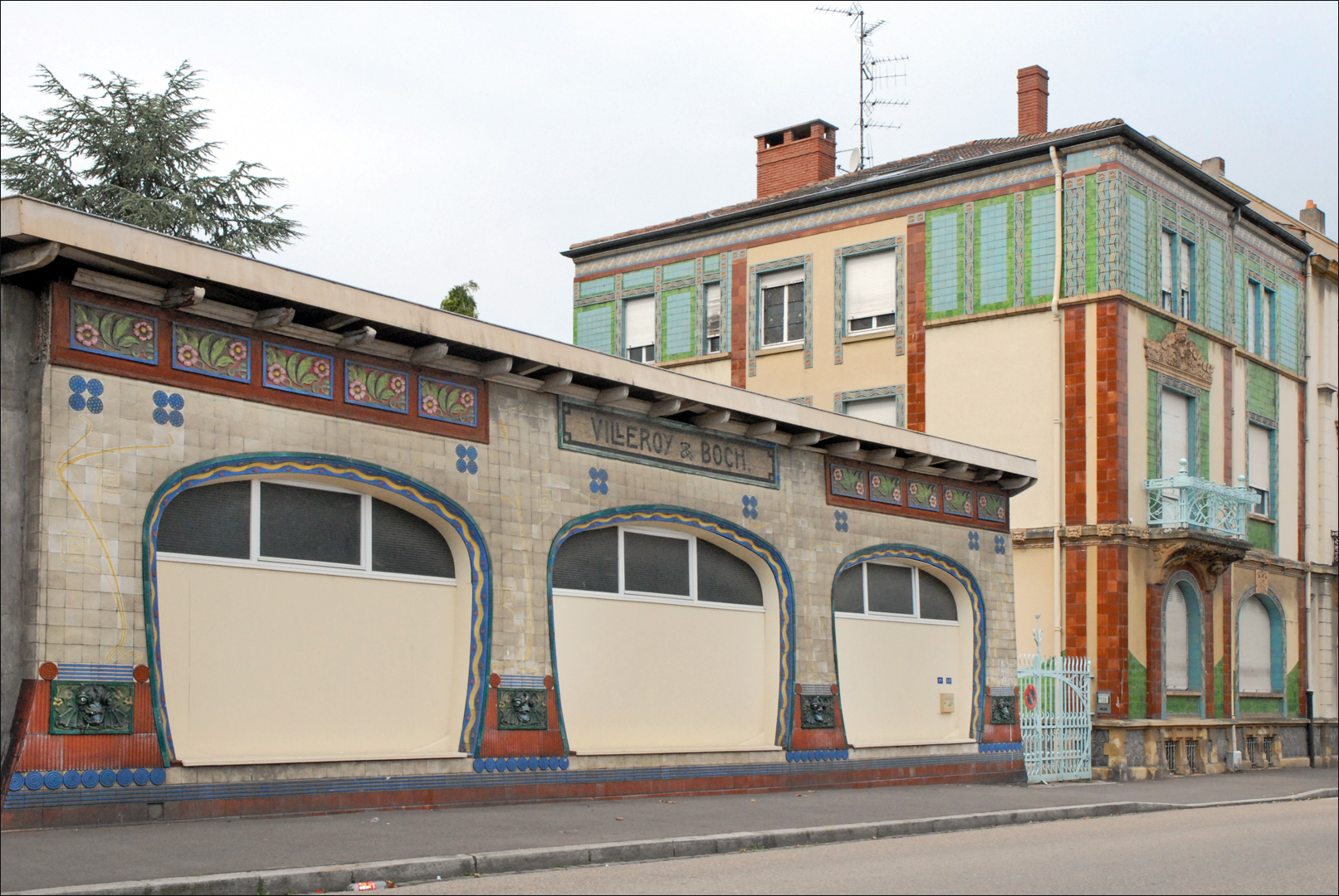 L'ancien magasin Villeroy et Boch 13-15 rue Charles Pêtre à Metz.. Anciens siège et magasin d'exposition de la firme. L'entreprise Villeroy & Boch est née, en 1748, de l’alliance de deux familles lorraines qui ont su développer l’art de la table tout en proposant des produits à des prix accessibles.